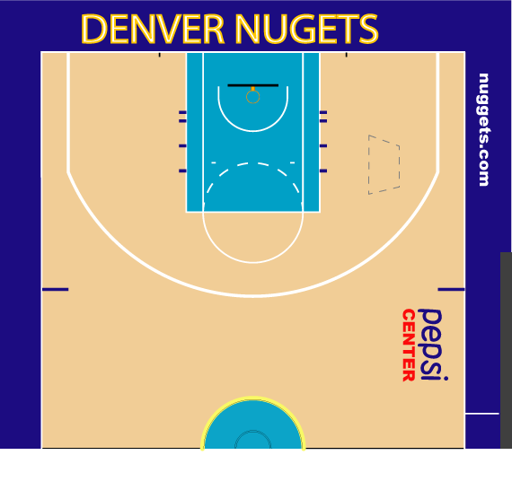 ナゲッツホームコート配色